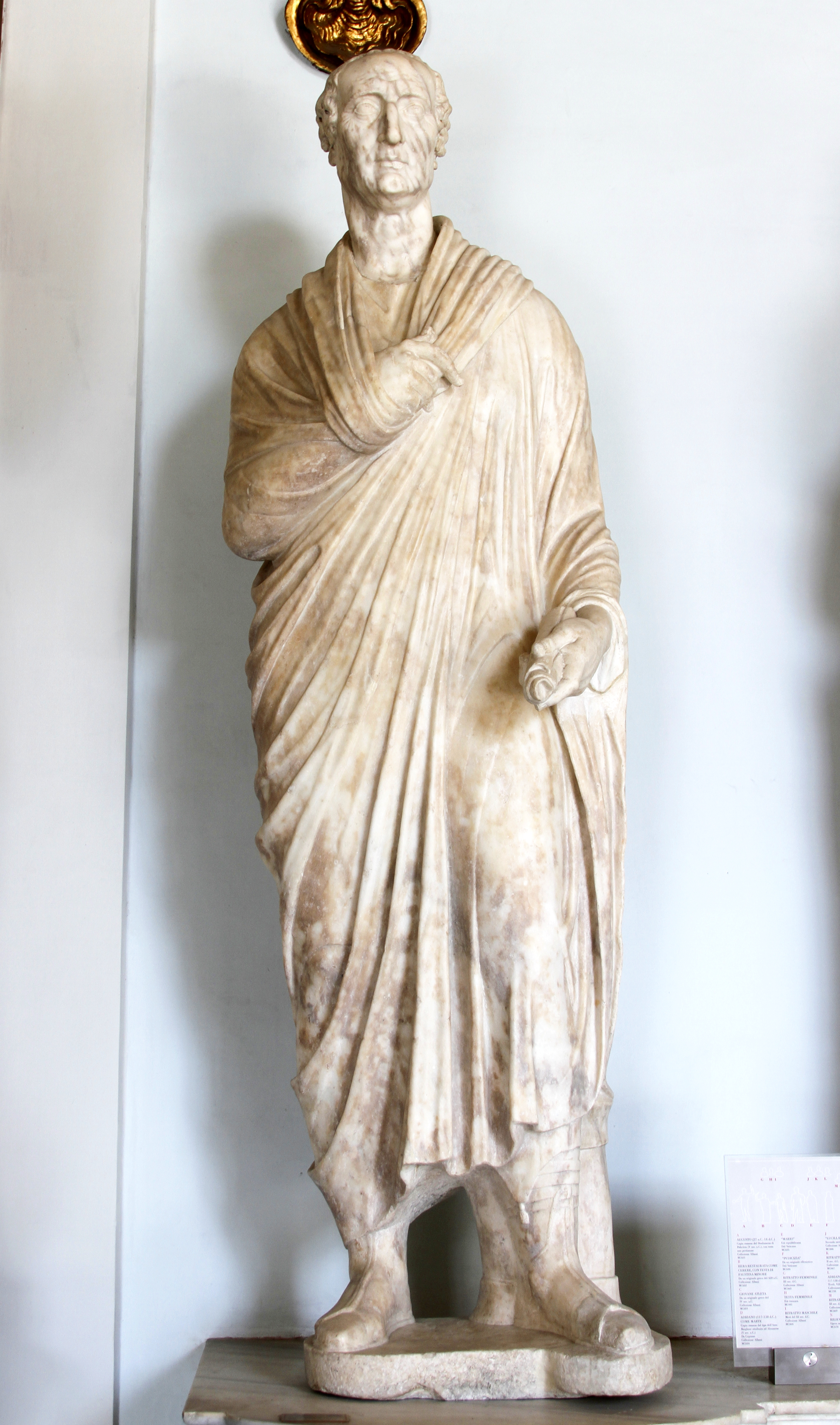 Palazzo Nuovo - Musei Capitolini - Rome